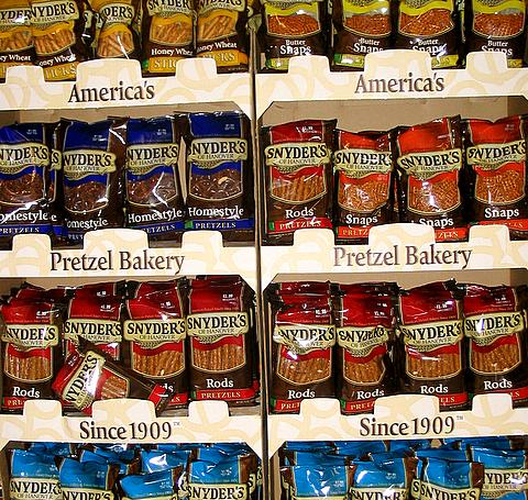 Pretzels on display at Kroger.